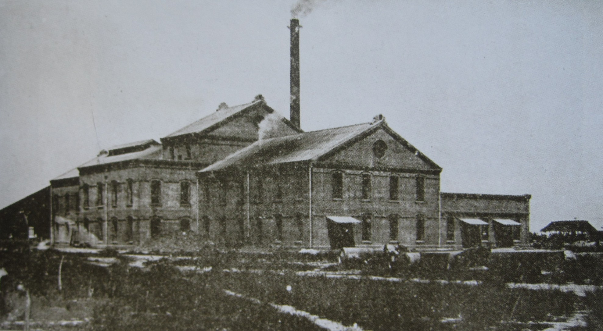 日治時期的岸內糖廠